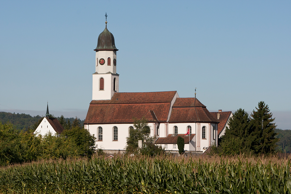 Katholische Kirche und Friedhofkapelle (Beinhaus) in Frick